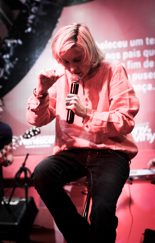 Ludmila Ferber em um show em 2012